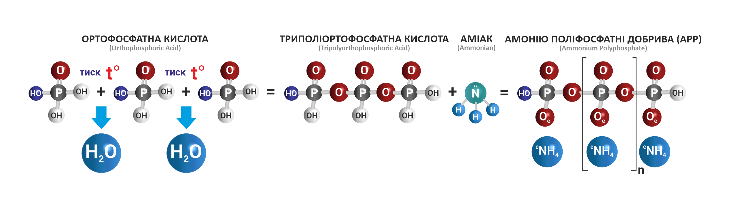 Спрощена схема виробництва Рідких Комлексних Добрив